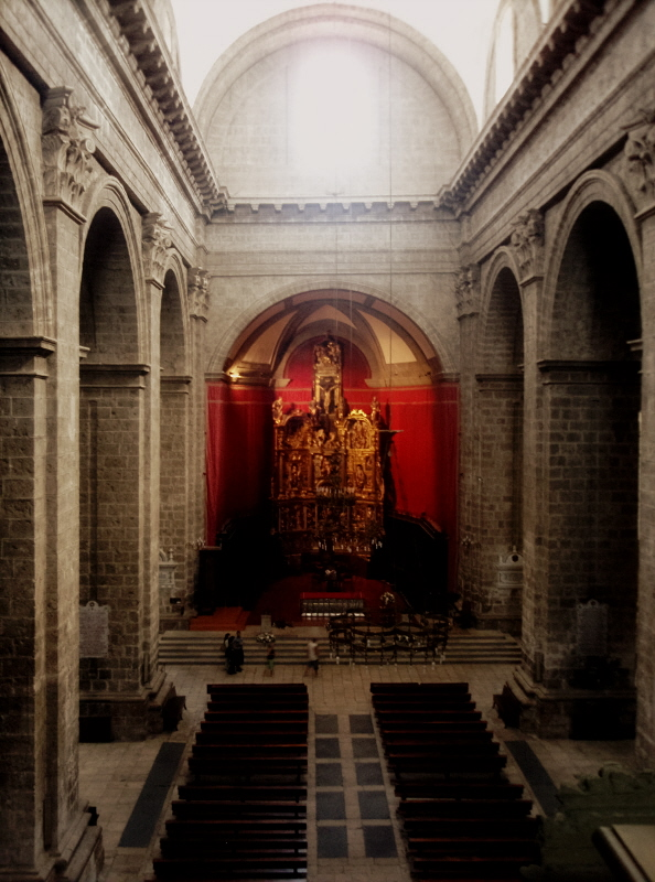 Catedral de Valladolid (España). Interior desde la tribuna del órgano. Se observa el retablo mayor de Juan de Juni.